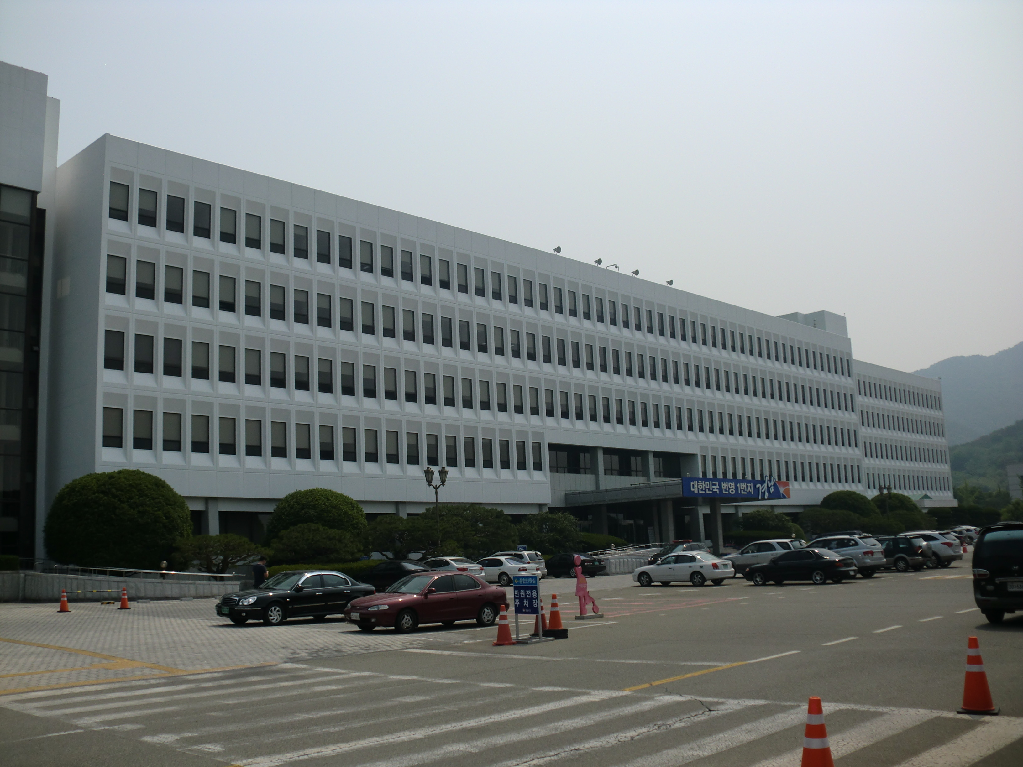 경상남도 창원에 있는 경상남도청